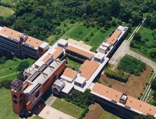 obra arquitectónica del brillante arquitecto venezolano Jesus Tenreiro Degwitz, ubicada cerca del Lago de Valencia en el estado Carabobo, Venezuela